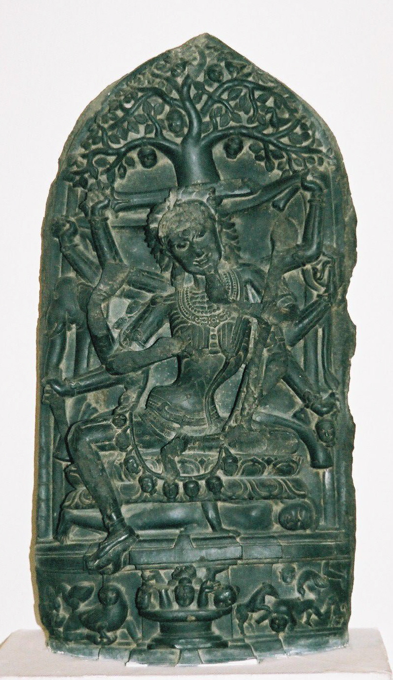 インド人の苦しみを全て表すヒンドゥー教の女神チャームンダー (2005/01/22 National Museum, Delhi, INDIA)